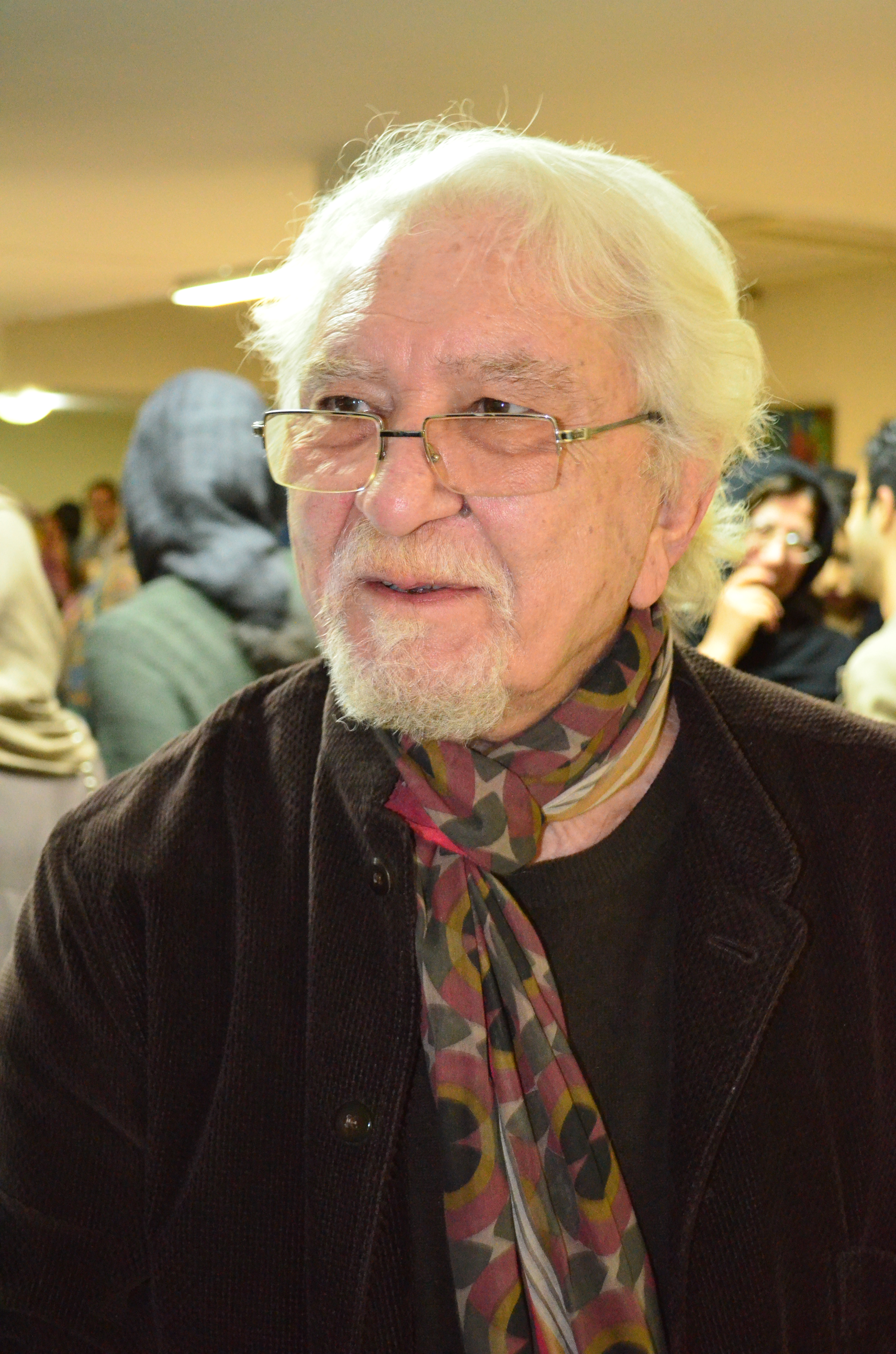 رحیم شایگان